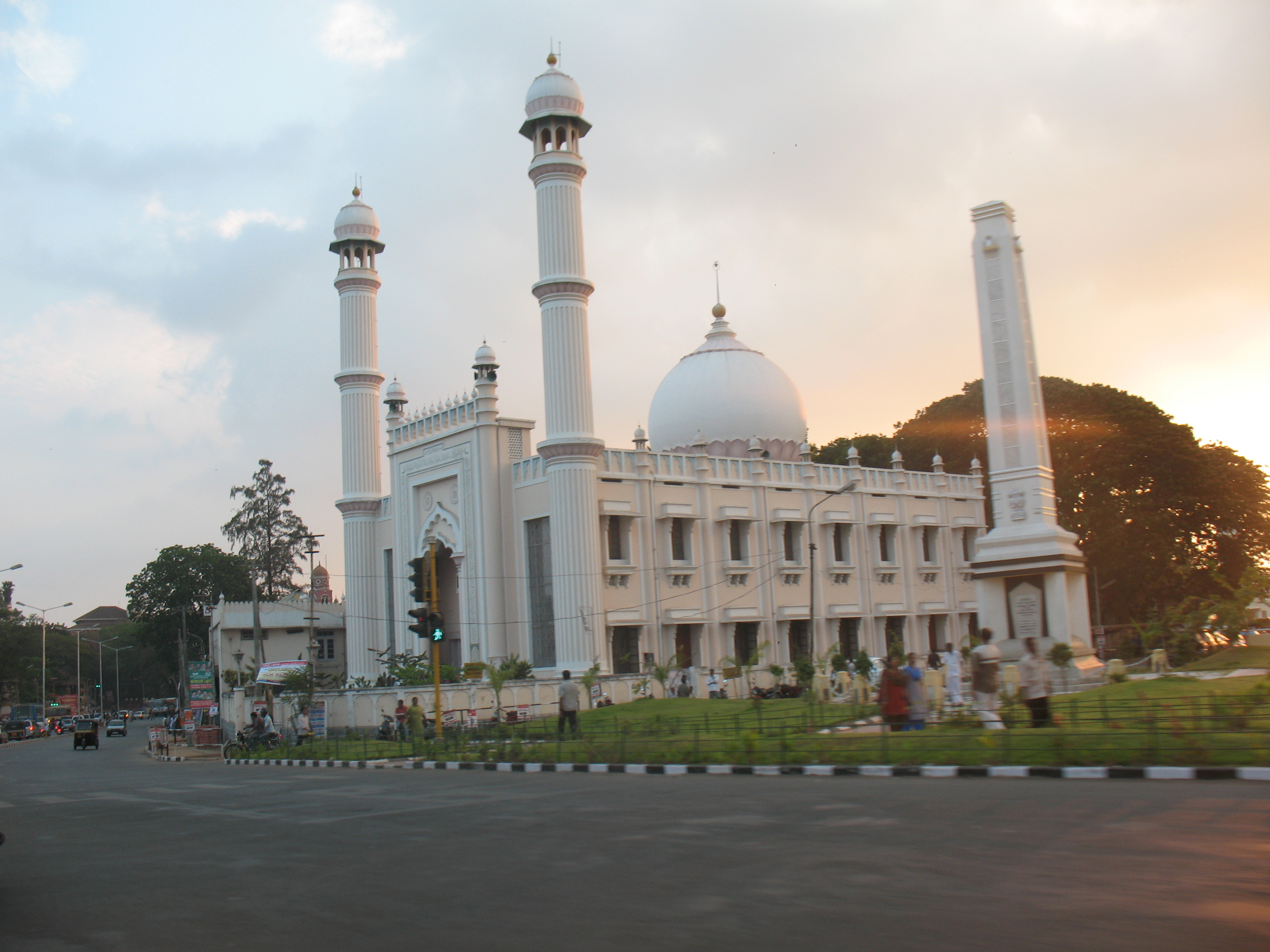 == അനുമതി ==